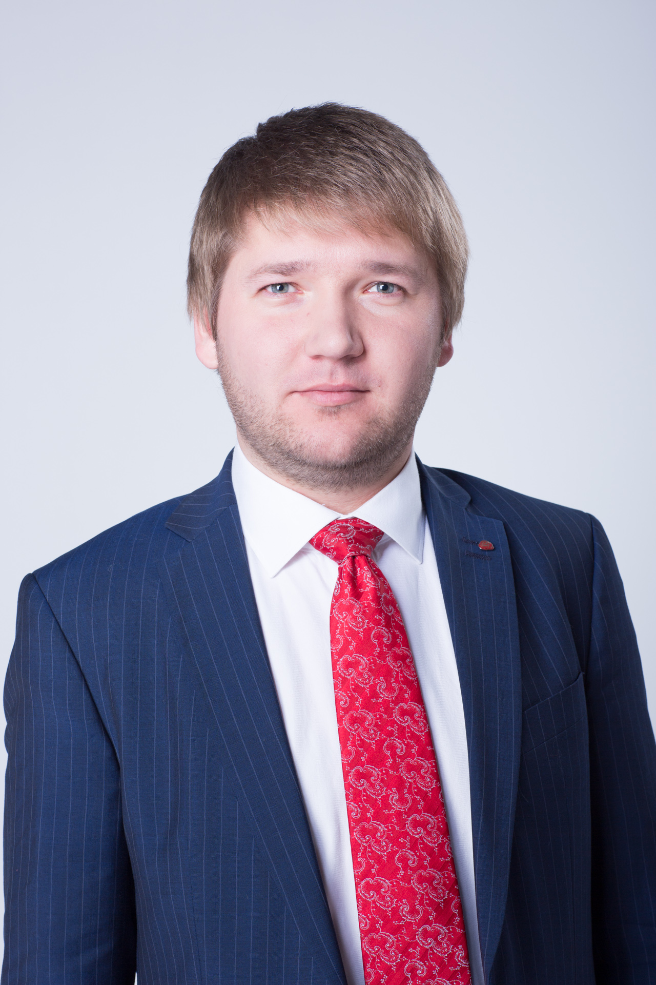 Priit Lomp, 2014